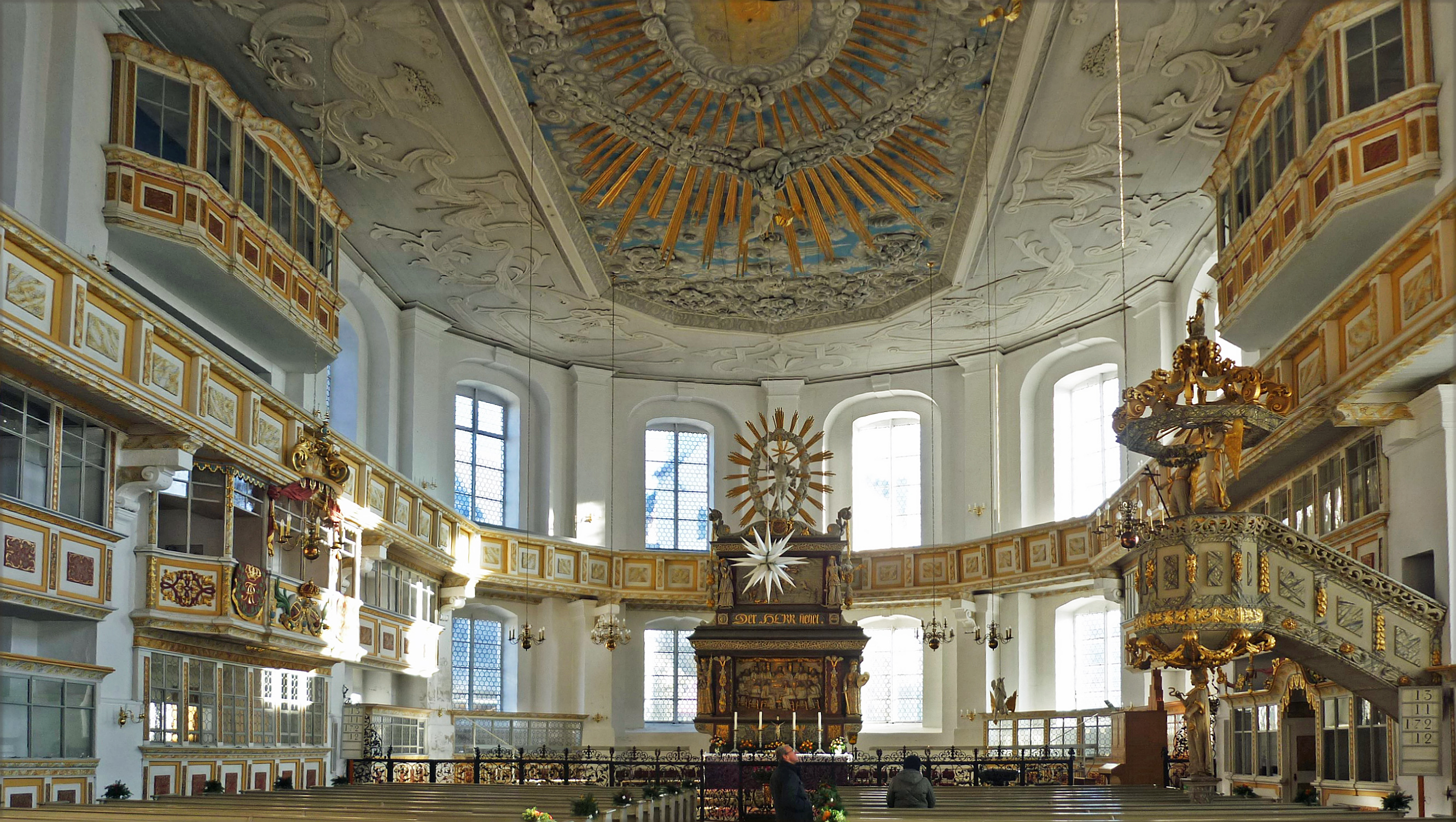 Advent 2014 im Erzgebirge – Kirche St. Georgen in Schwarzenberg/Erzgeb.